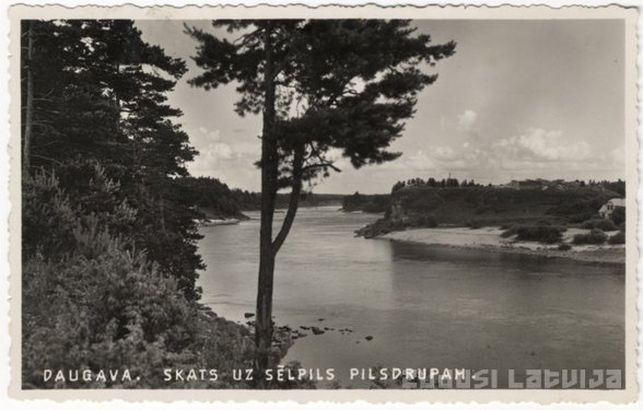 Sēlpilsi muinaslinnuse ja foogtilinnuse asukoht Daugava kaldal